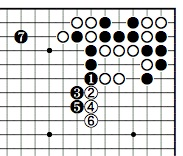 oonadare-joseki-1968-mukai